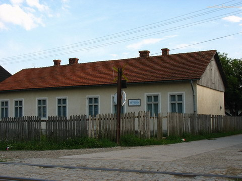 „Ion Nistor” Memorial House from Bivolărie